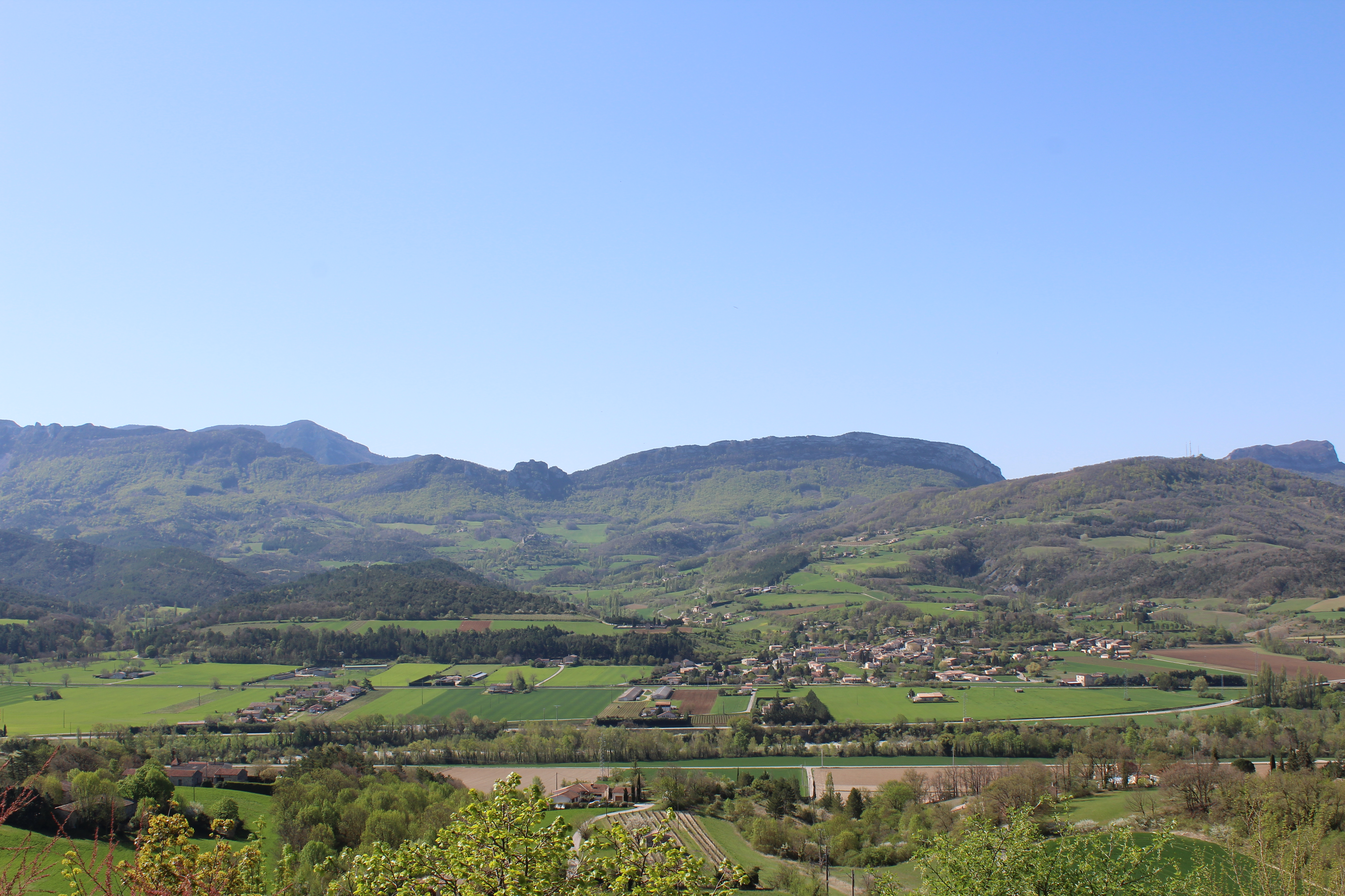 Photographie de la commune du Nord au Sud prise du village de Mirabel et Blacon